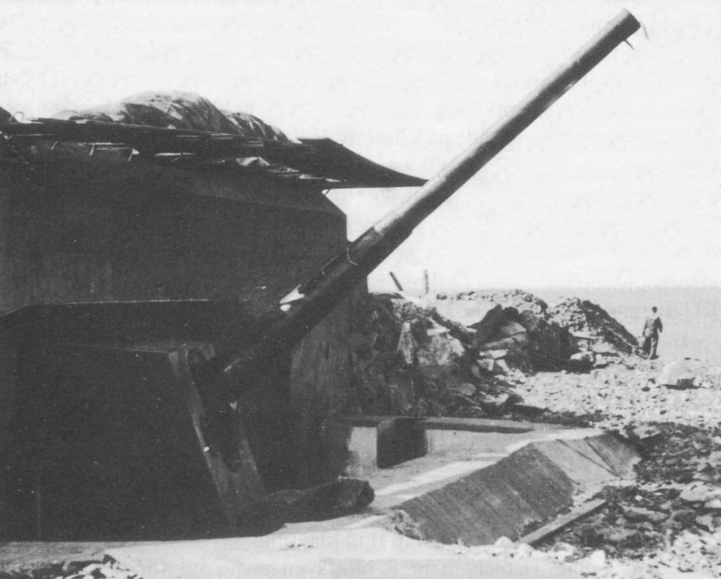 15 cm pjäs i batteri Roten